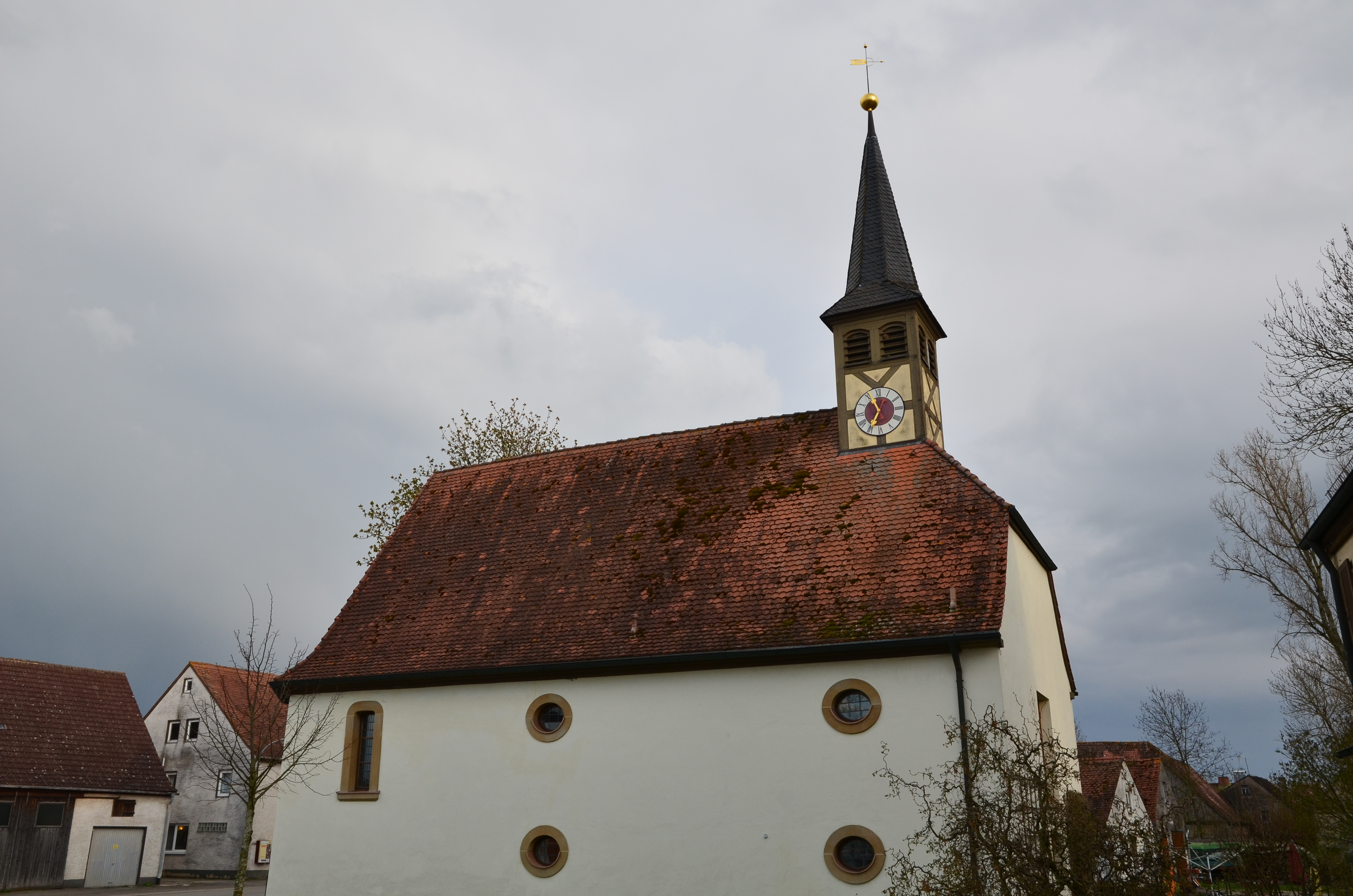 Gemeindezentrum St. Laurentius in Kaubenheim